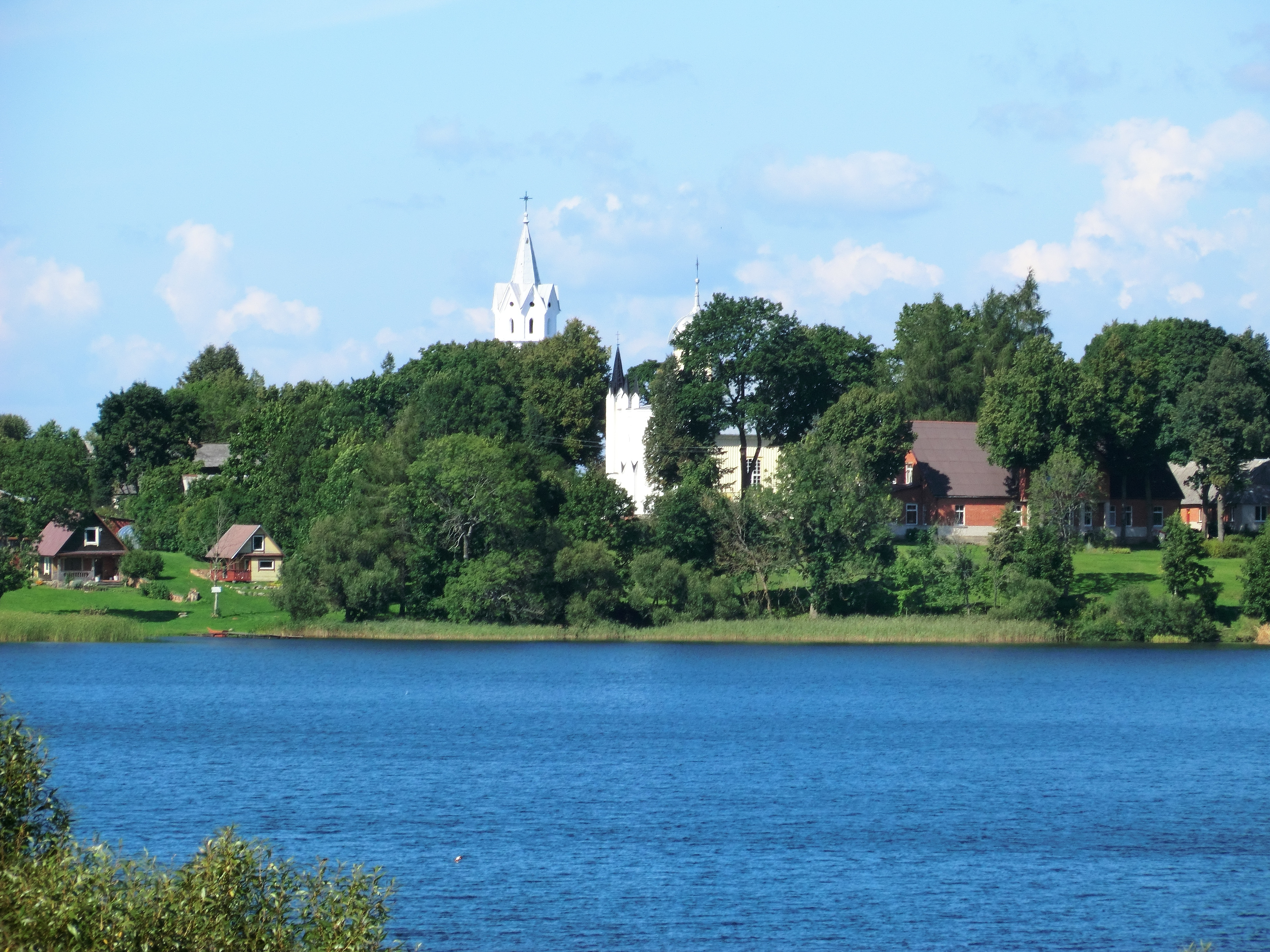 Svėdasai